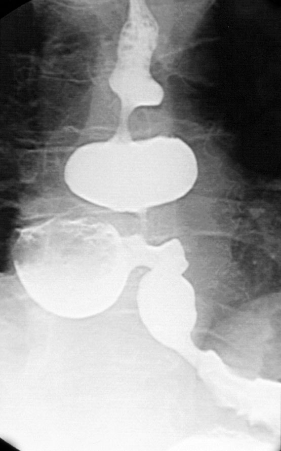 Diffuser Ösophagusspasmus mit grossem epiphrenischem Divertikel und Barsony-Pseudodivertikeln